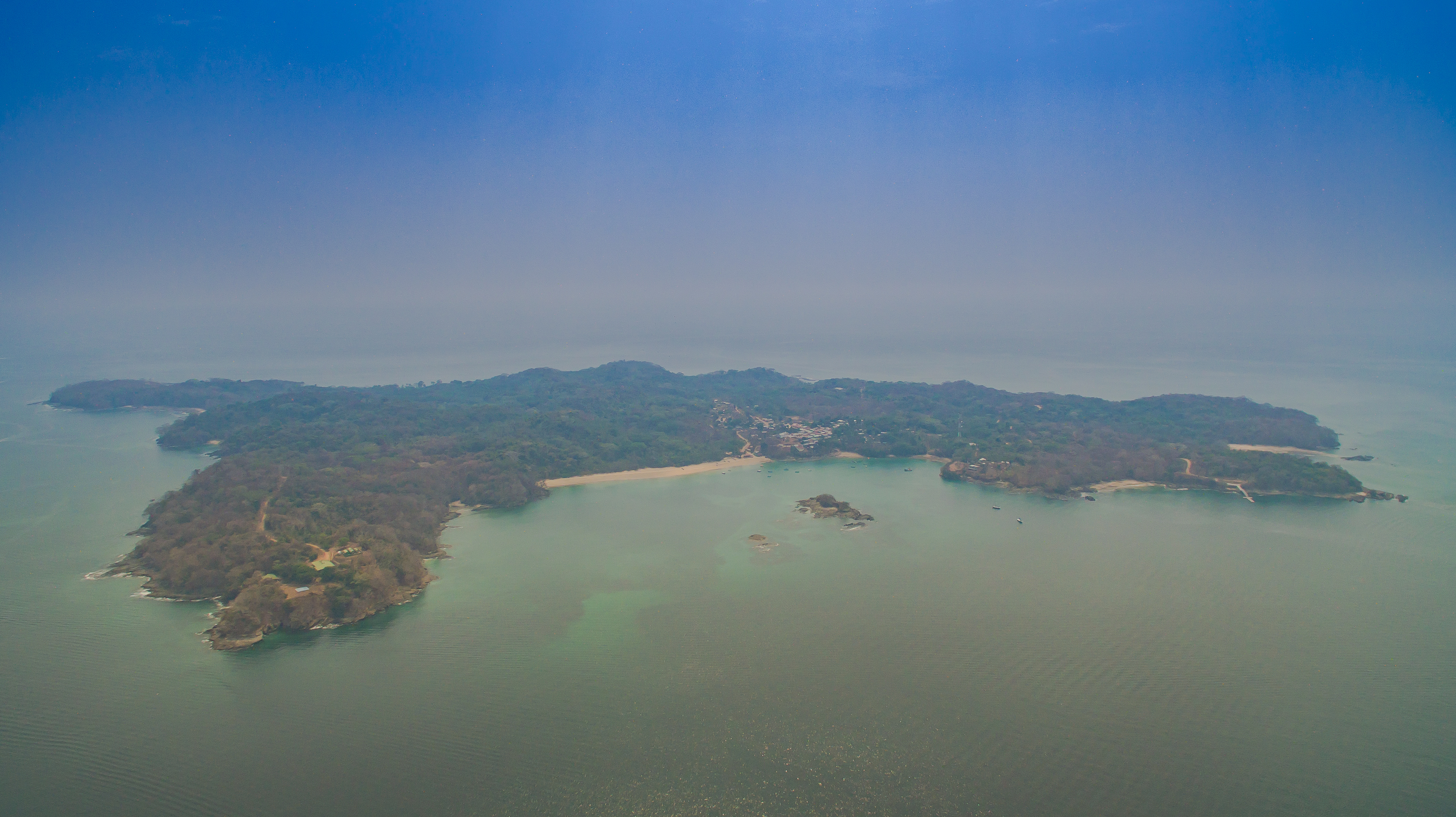 Pazifik Archipel in Panama